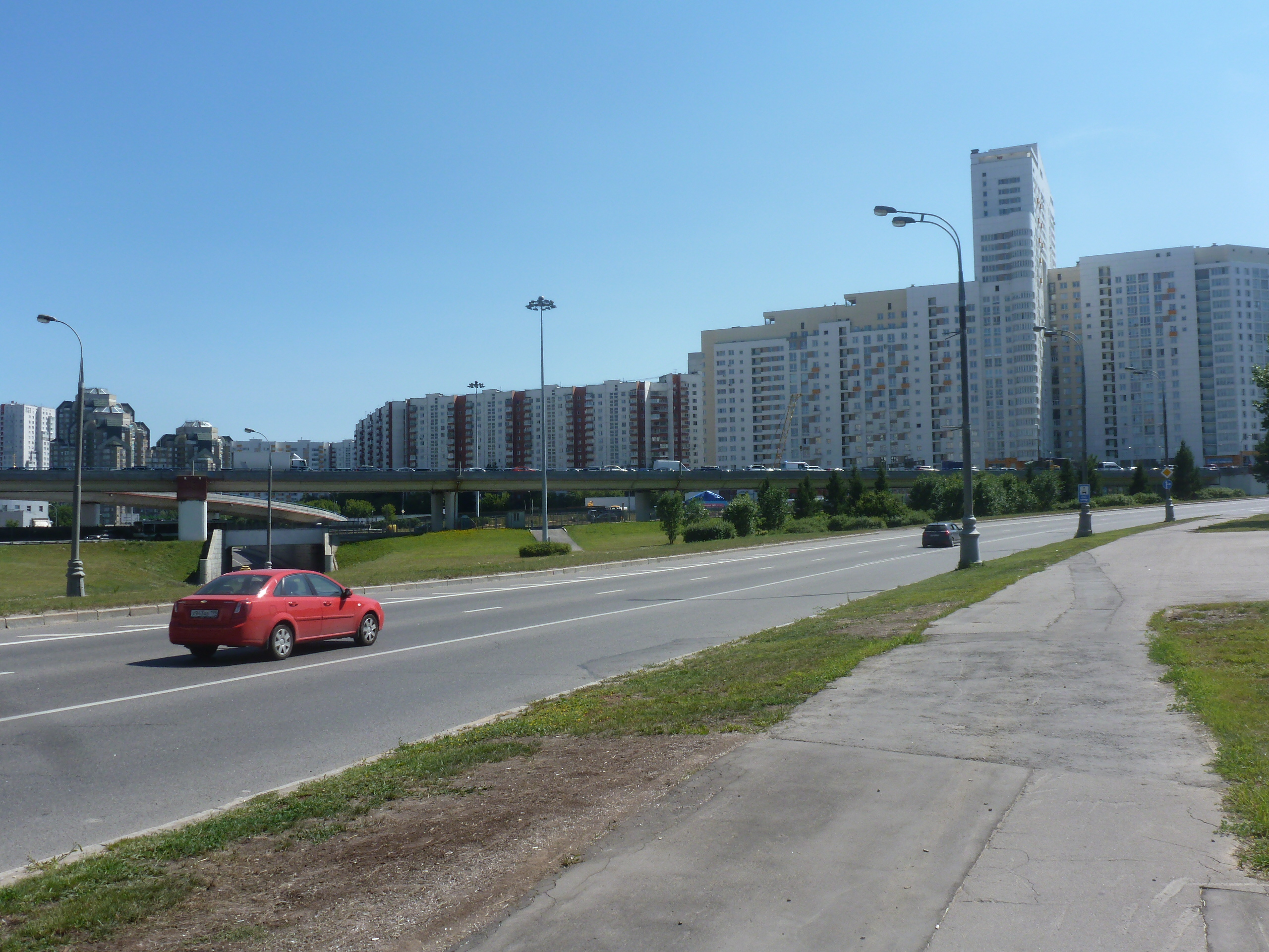 Krucigxo de Vernadskij-avenuo kaj Lenin-avenuo